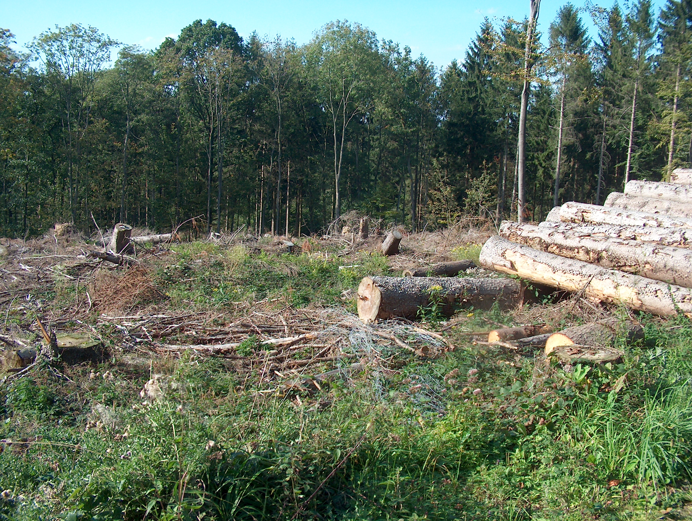 Wald in Ergste-Bürenbruch nach Sturm Kyrill.